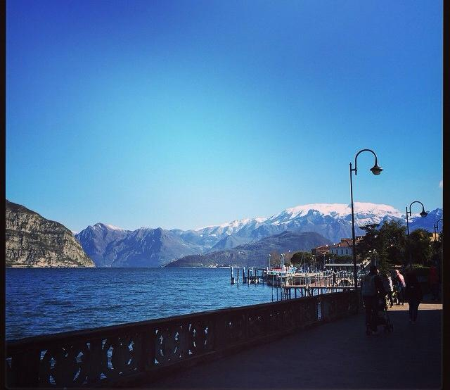 lungolago di Iseo